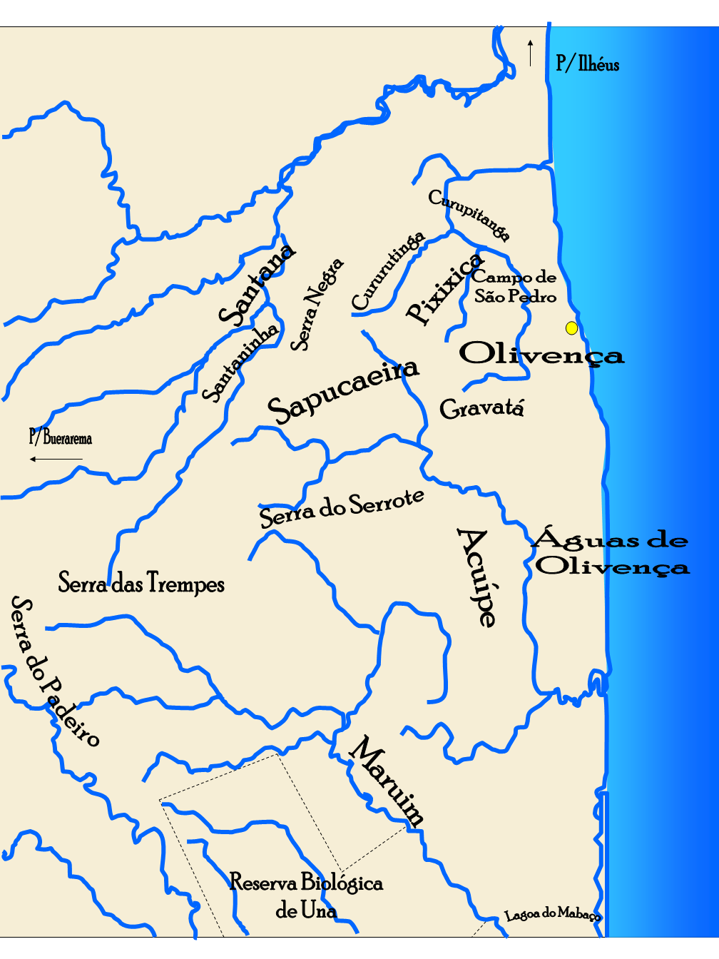 Mapa das áreas ocupadas pelo povo Tupinambá de Olivença